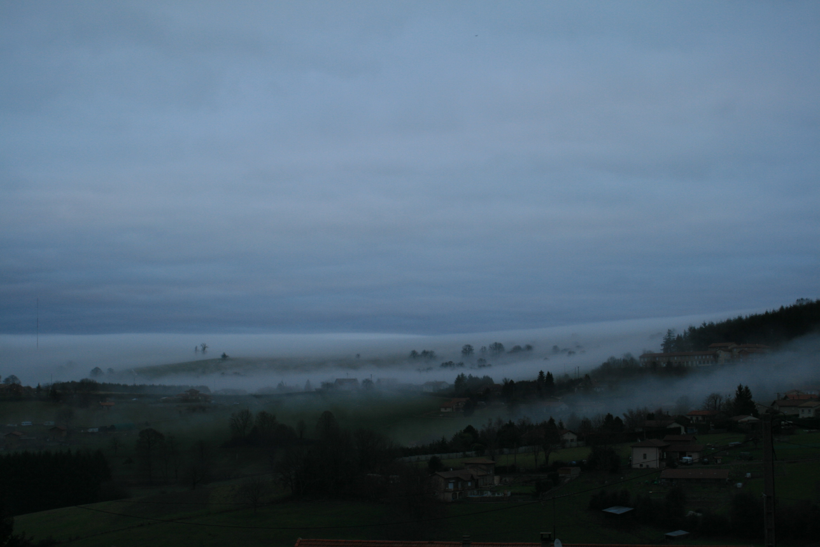 Passage du brouillard depuis le versant rhôdanien au dessus de Violay [Loire] sur la ligne de partage des eaux.